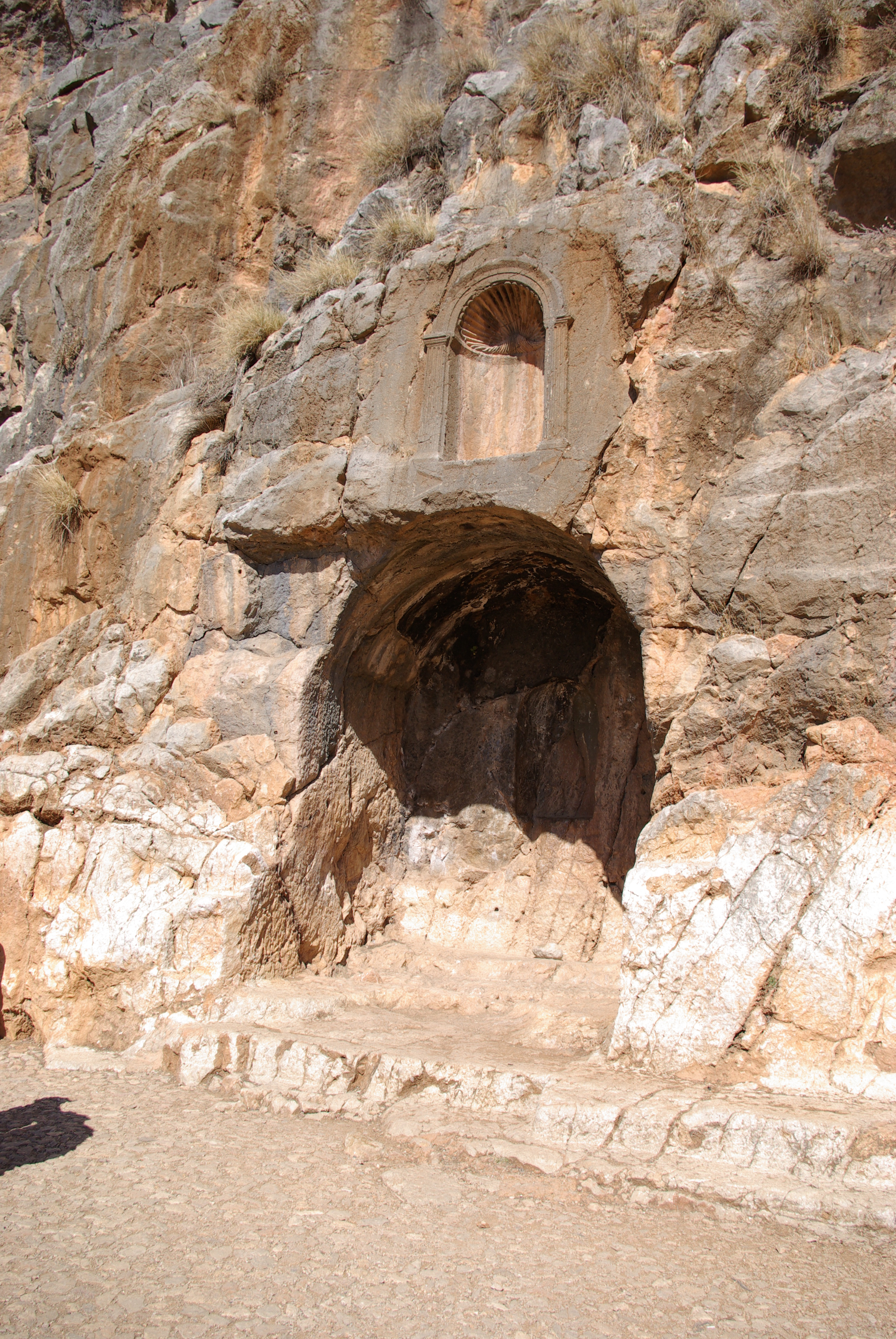 Banyas, Nische in der eine Pan Statue stand